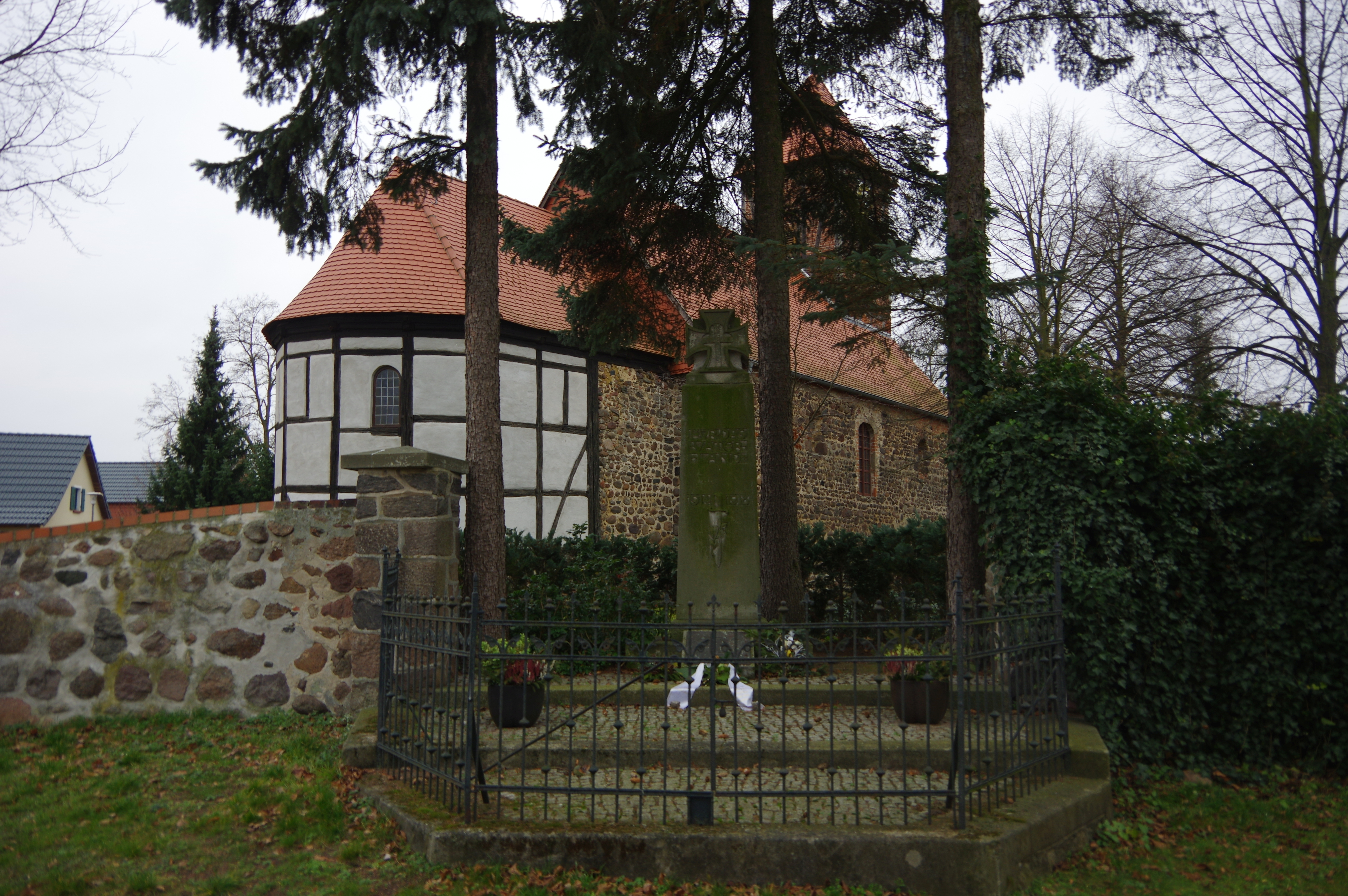 Möckern, Ortsteil Rietzel. Das Kriegerdenkmal ist denkmalgeschützt.Es befindet sich östlich der Kirchge